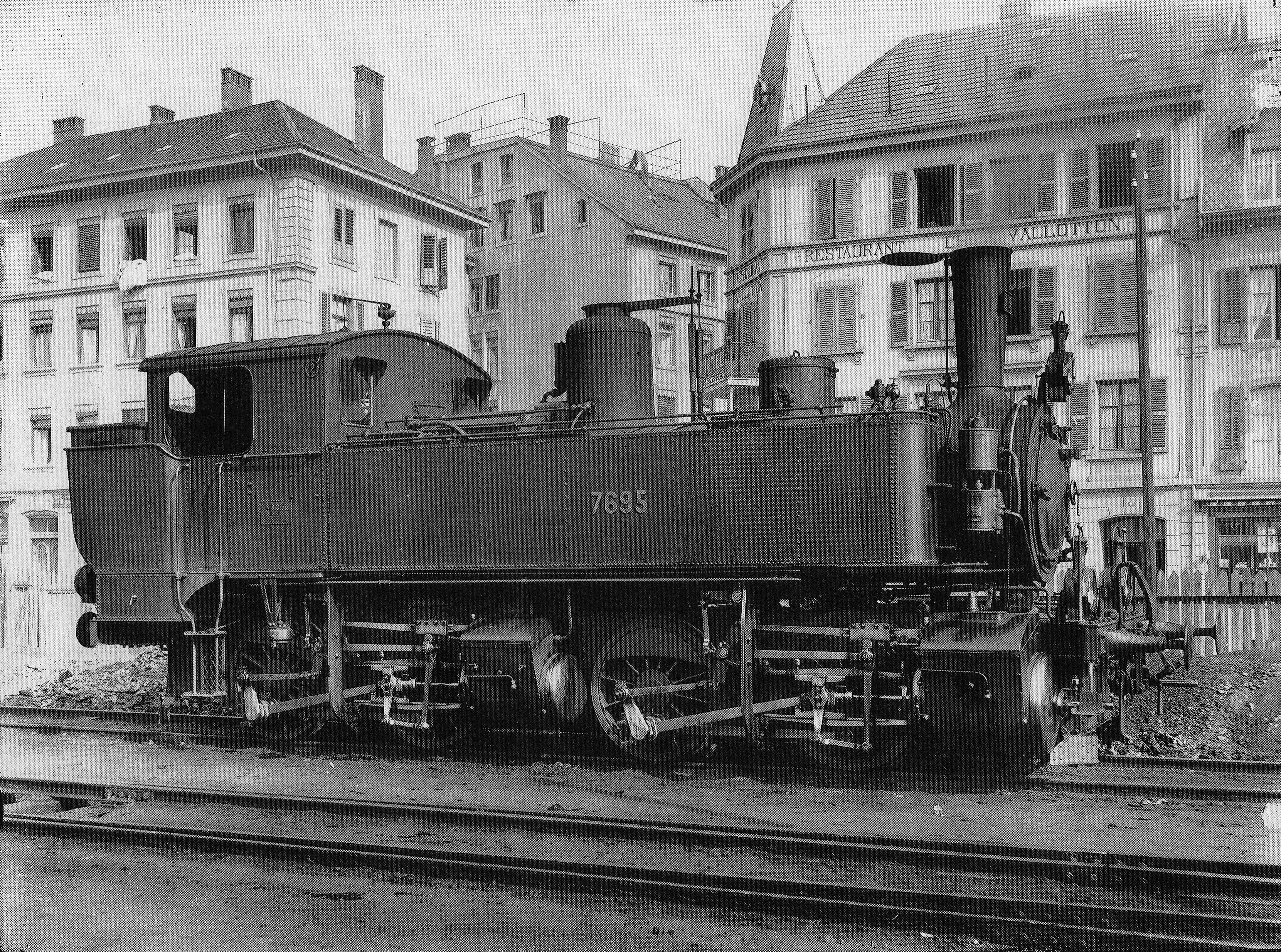 Güterzuglocomotive Nr. 7695 des Typs Ed 2×2/2 der Schweizeriſchen Bundesbahnen, vormahls Nr. 195 der Schweizeriſchen Centralbahn, gebaut 1893 inn der Locomotiv-Fabrique J. A. Maffei zů München (Fabricationsnr. 1709), 1912 ausrangirt und anſchließend abgebrochen; aufgnommen um 1902.